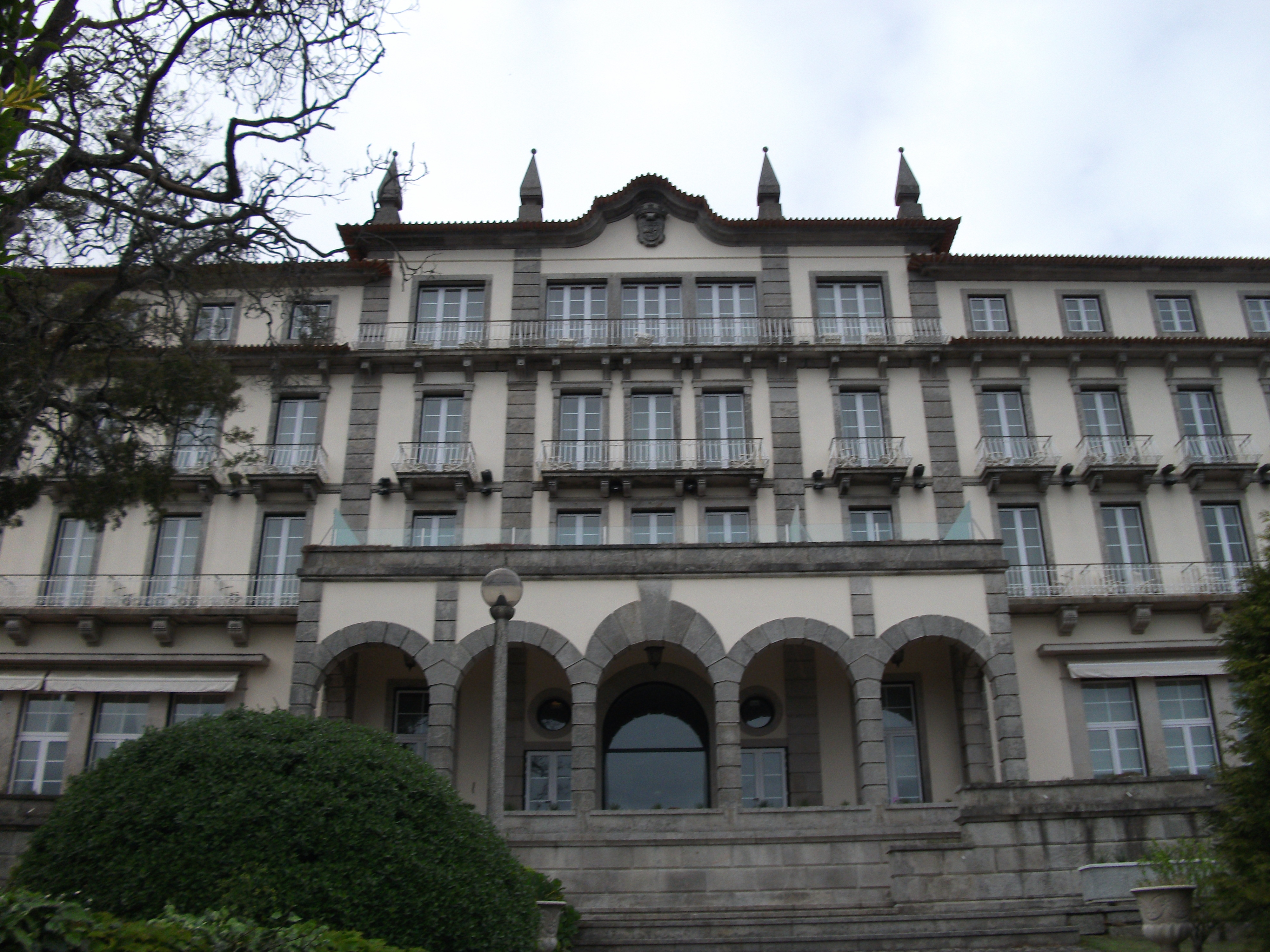 Aspecto exterior